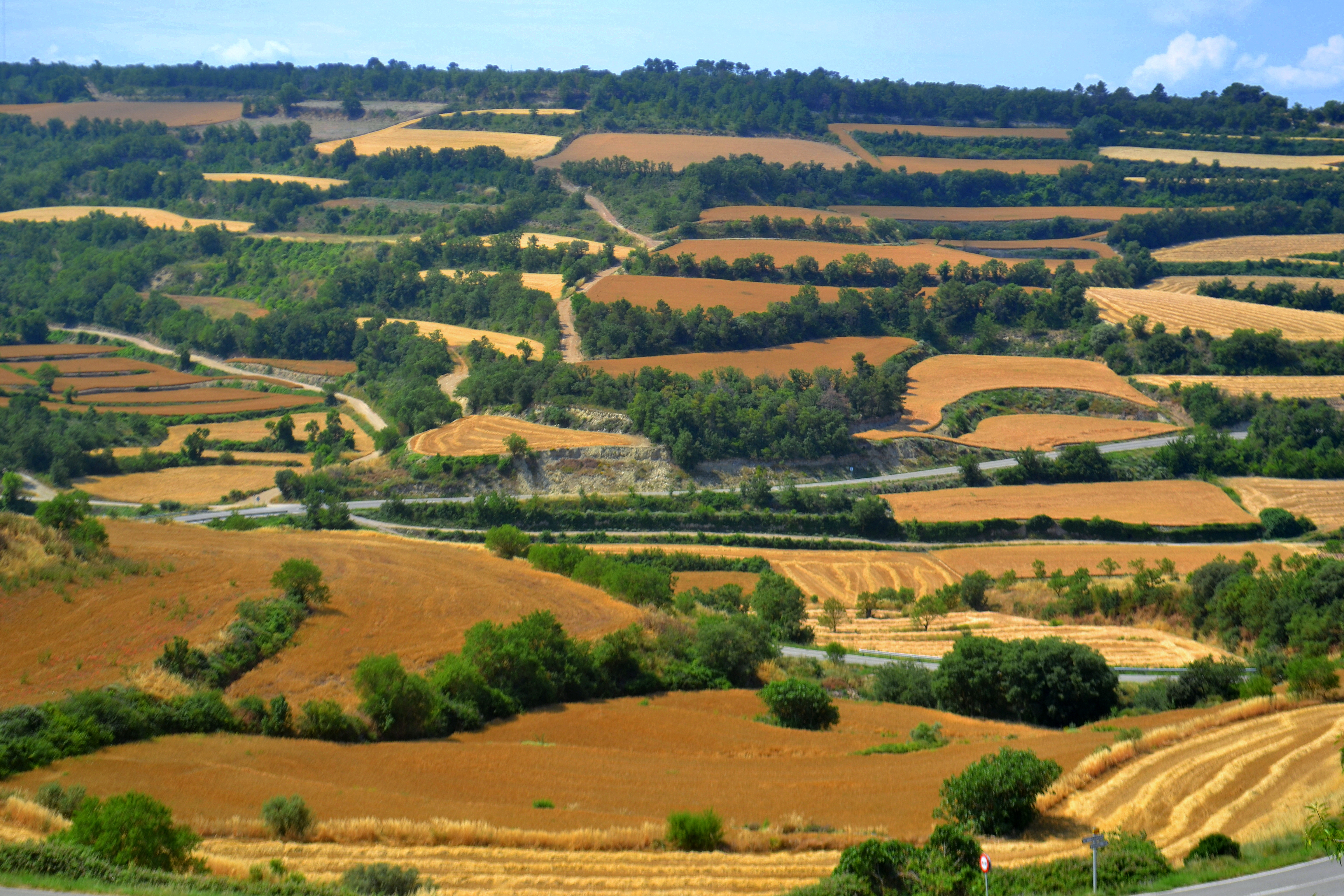 Camps de Montoliu de Segarra, espai protegit de Granyena This is a a photo of a natural area in Catalonia, Spain, with id: ES510254